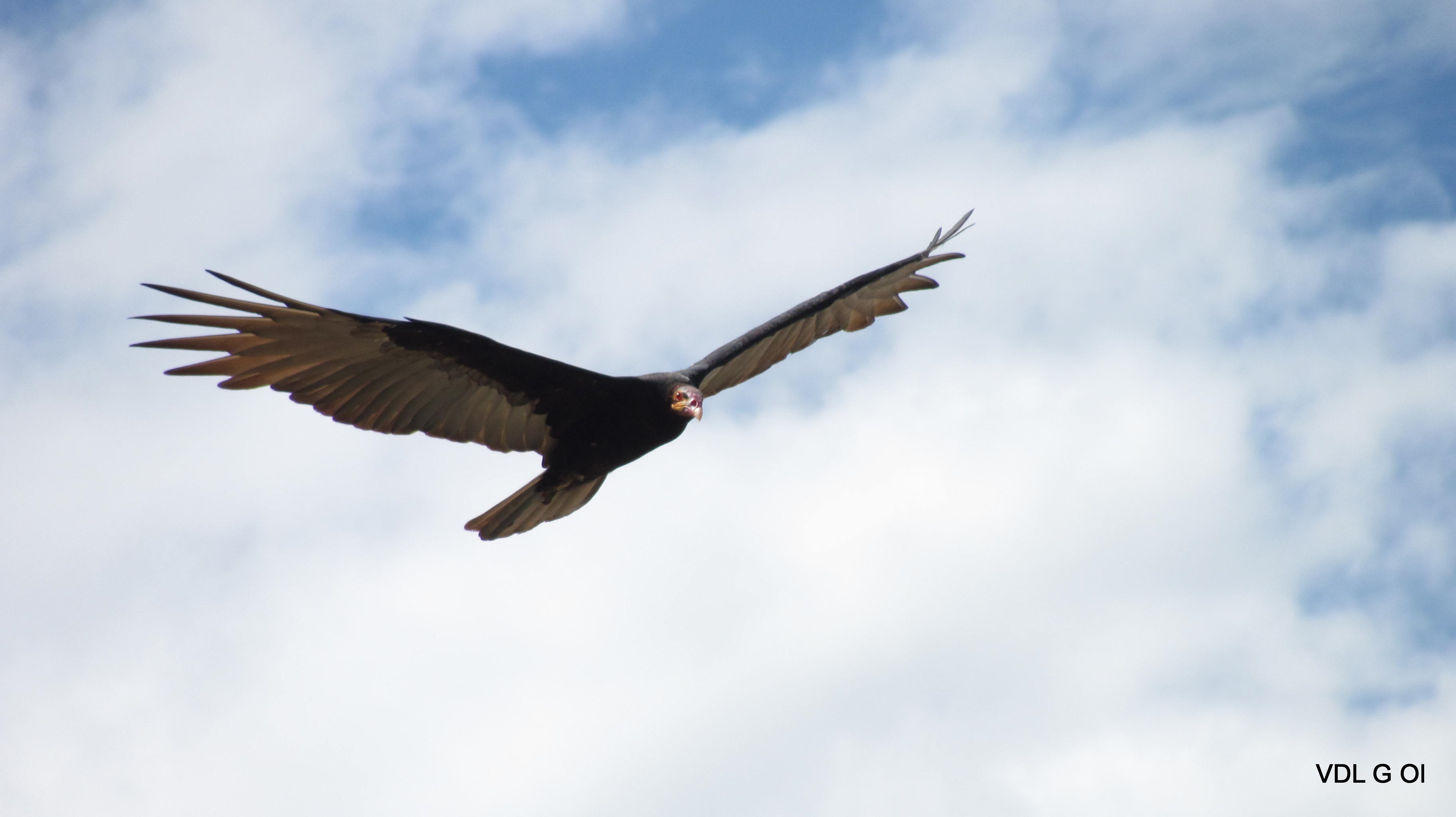 Urubu-de-cabeça-vermelha umá belíssima ave, muito comum na Caatinga, essa foi fotografada por mim no povoado de Poço Grande em Araci Bahia, sobrevoando a Caatinga